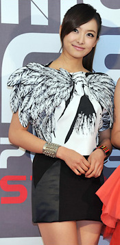 f(x). 2011년 2월, MTV-DAUM 뮤직 페스트에서.